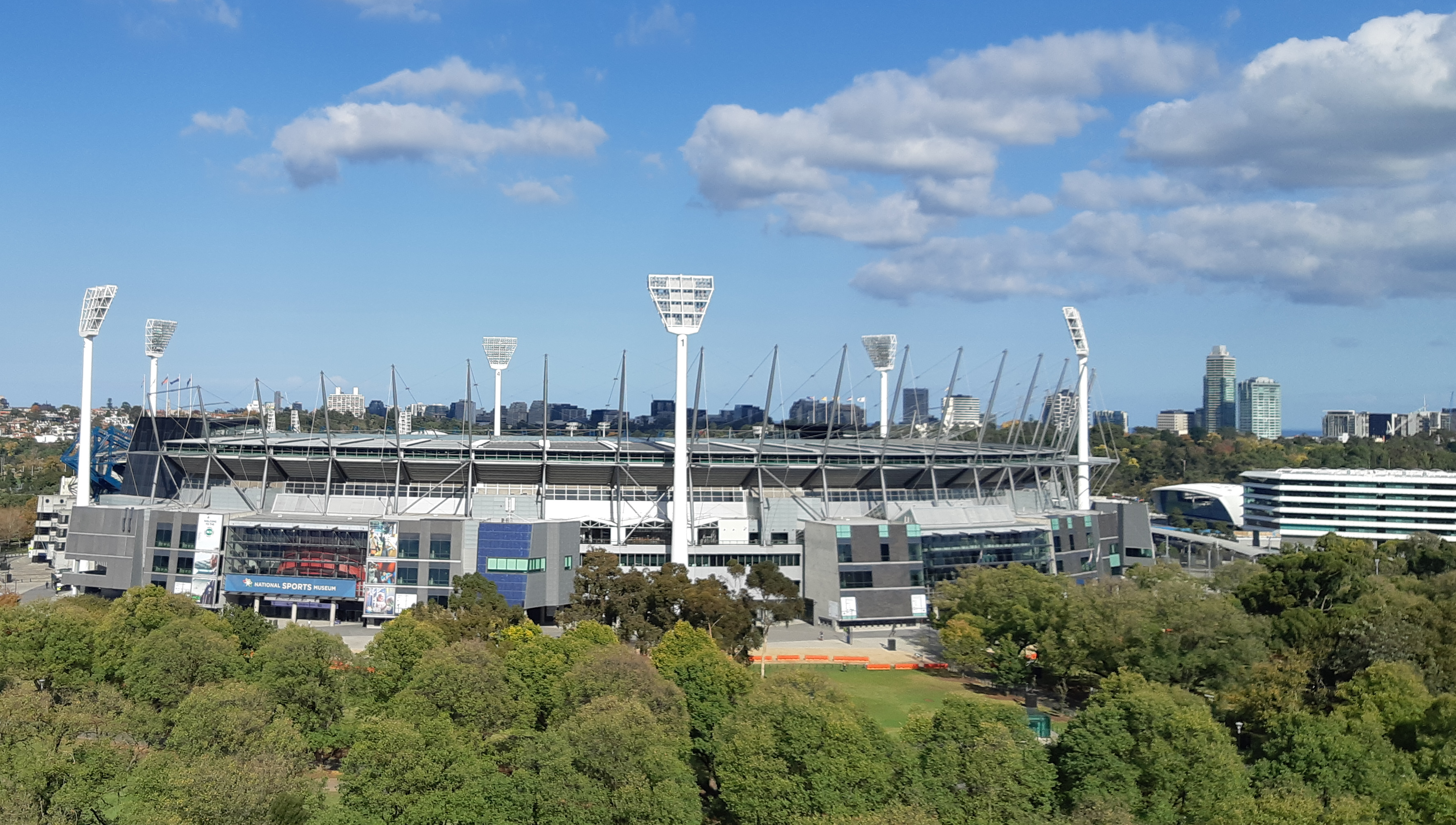 Melbourne Cricket Ground